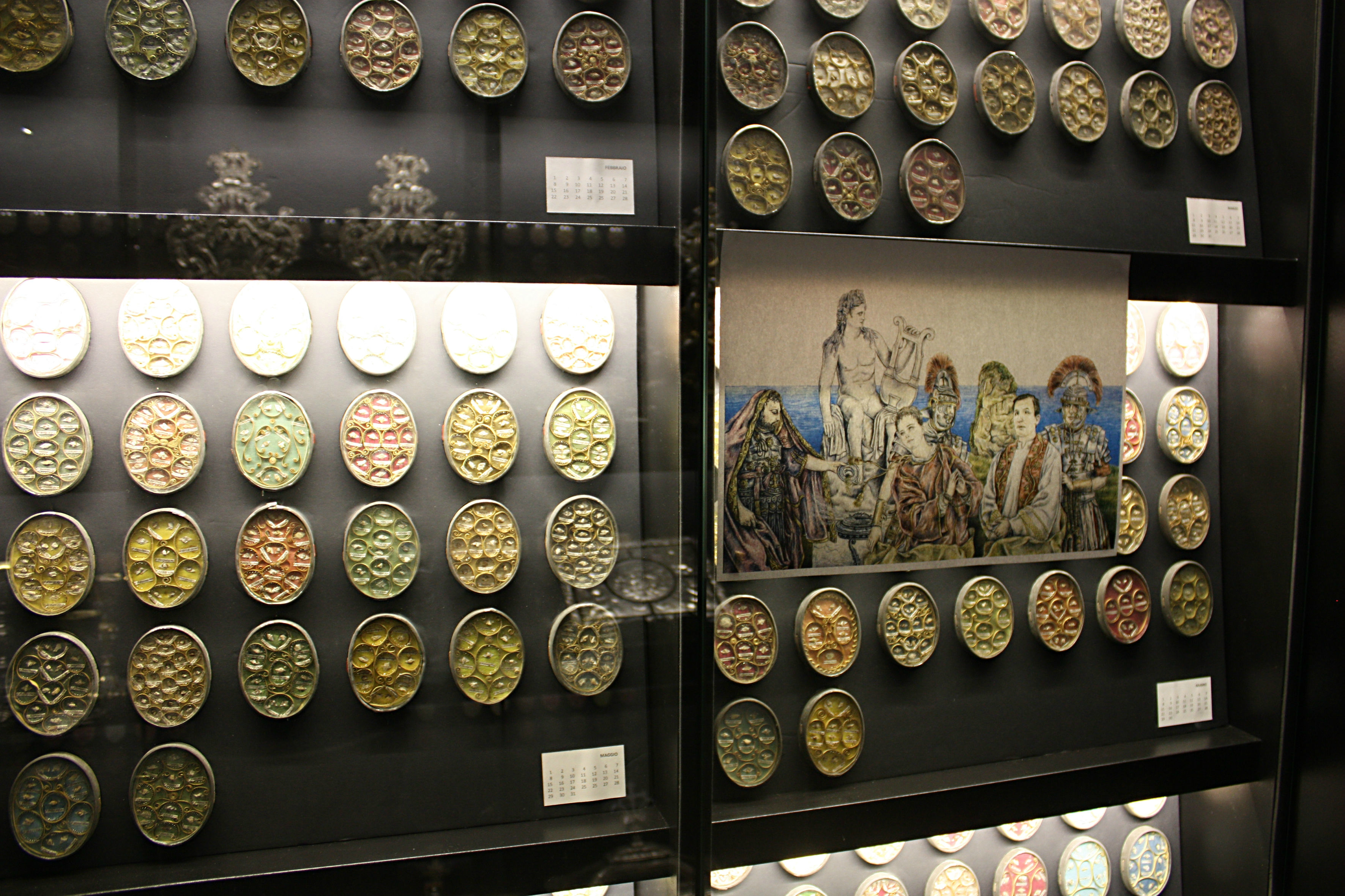 Milano, Museo San Fedele: esposizione dell'illustrazione "Martirio dei SS. Cesario e Giuliano in Terracina" sulla vetrina delle Reliquie dei 365 giorni dell'anno (XVI-XVII sec), che contiene frammenti ossei dei SS. Cesario e Giuliano.